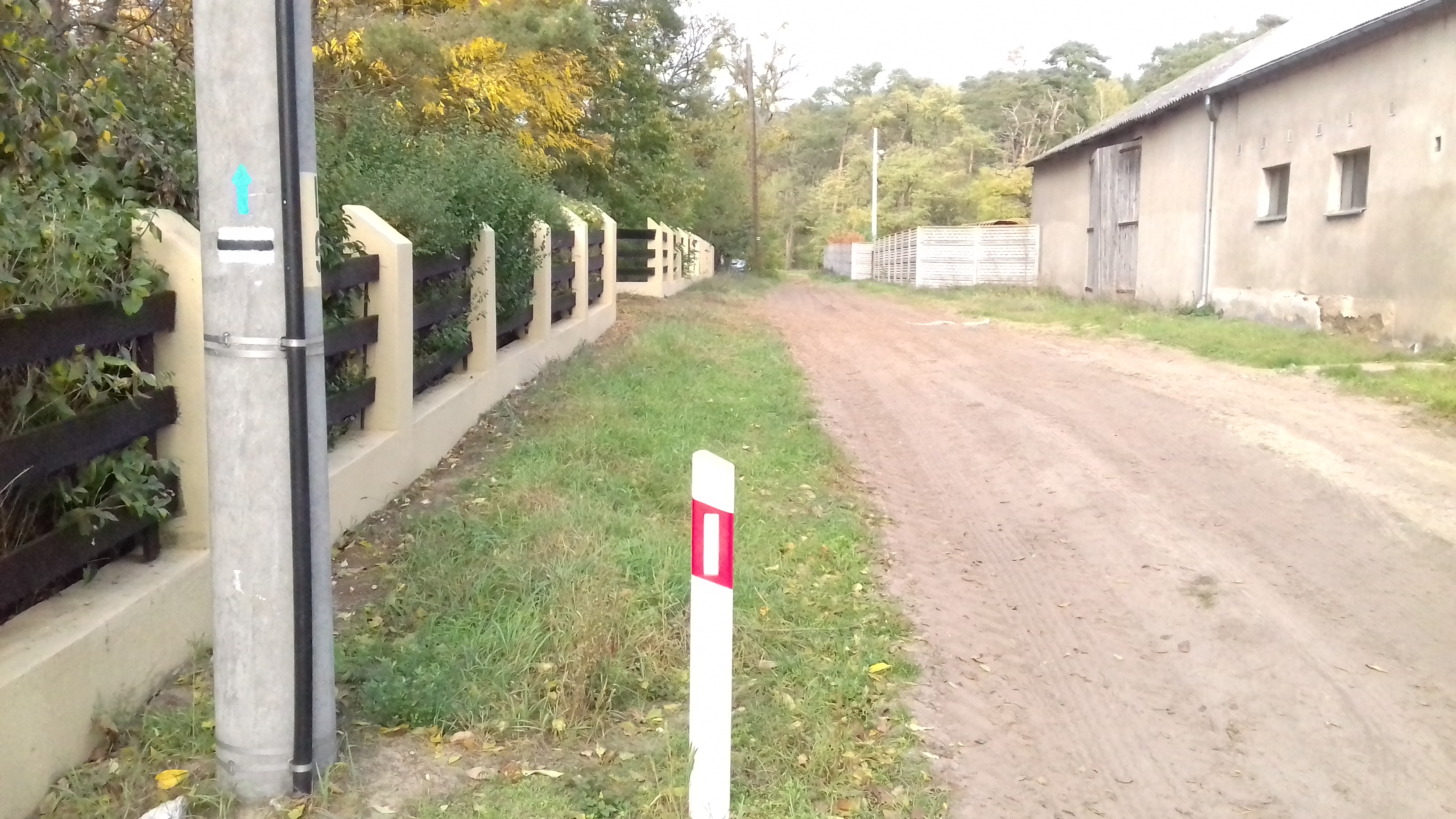 Majdany, oznaczenie turystycznego szlaku pieszego nr 3580 (czarnego)